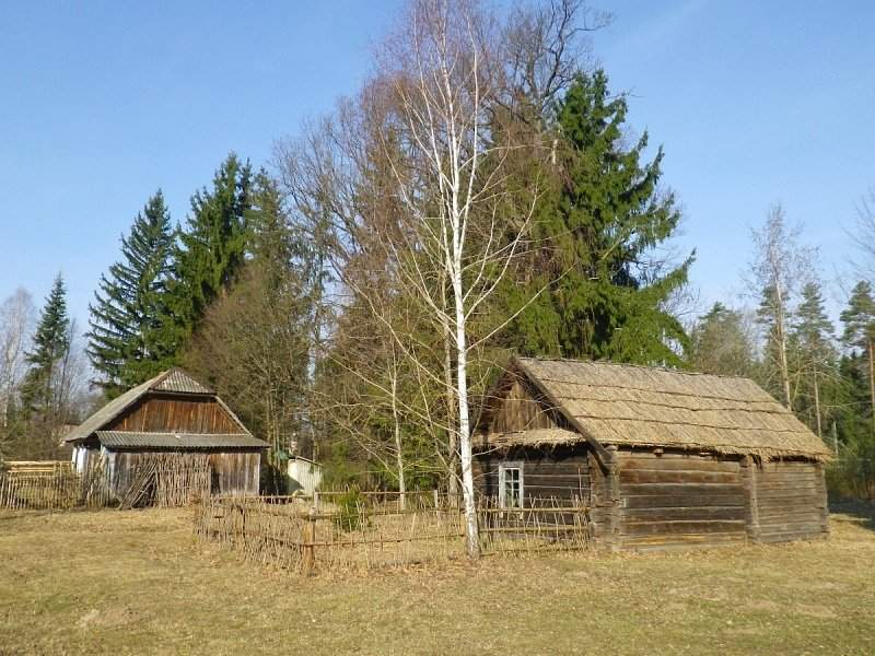 Глуша. Музей рамёстваў